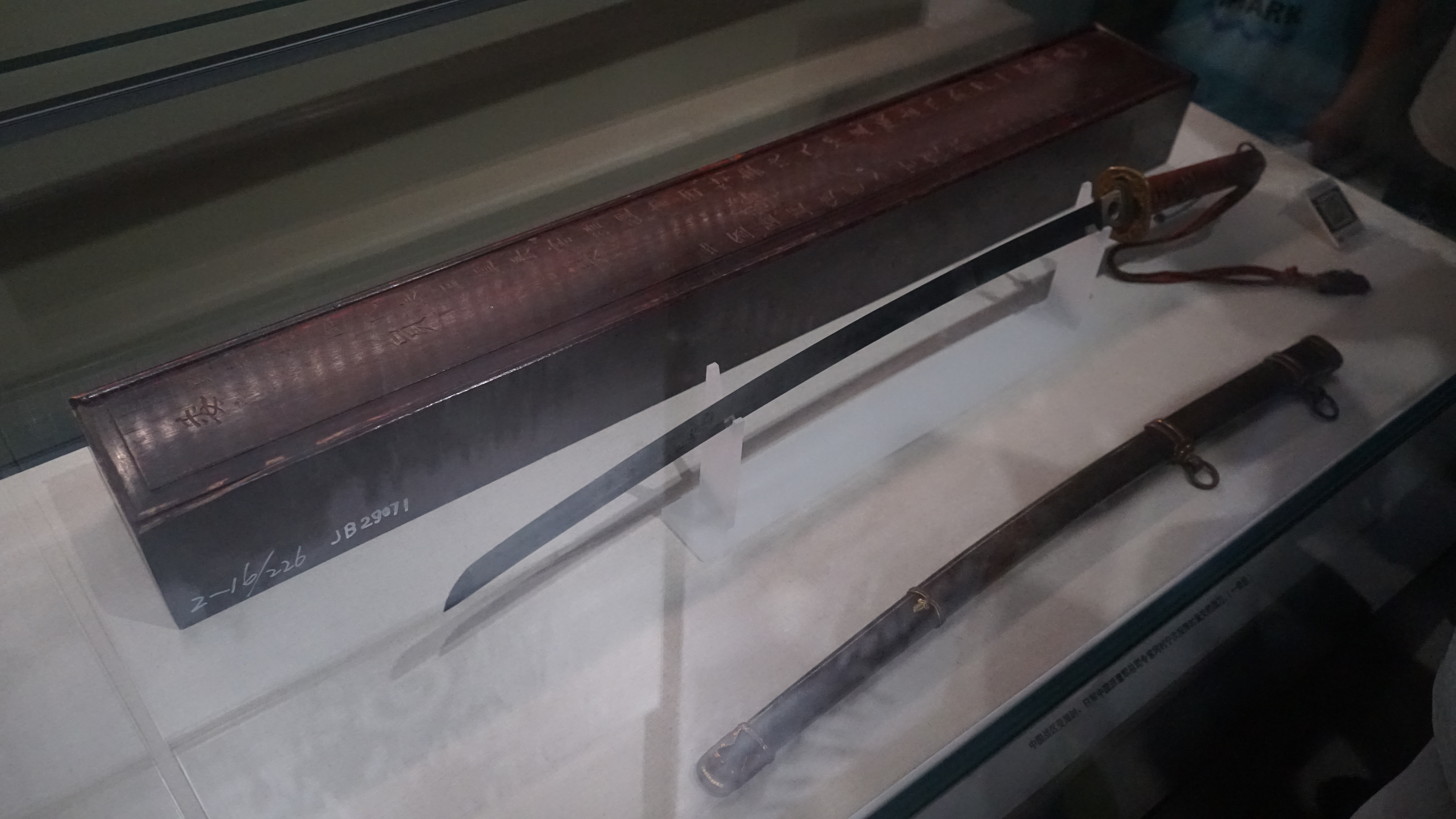 中文（中国大陆）: 中国战区受降时，中国派遣军总司令官冈村宁次投降时呈交的战刀。一级文物。